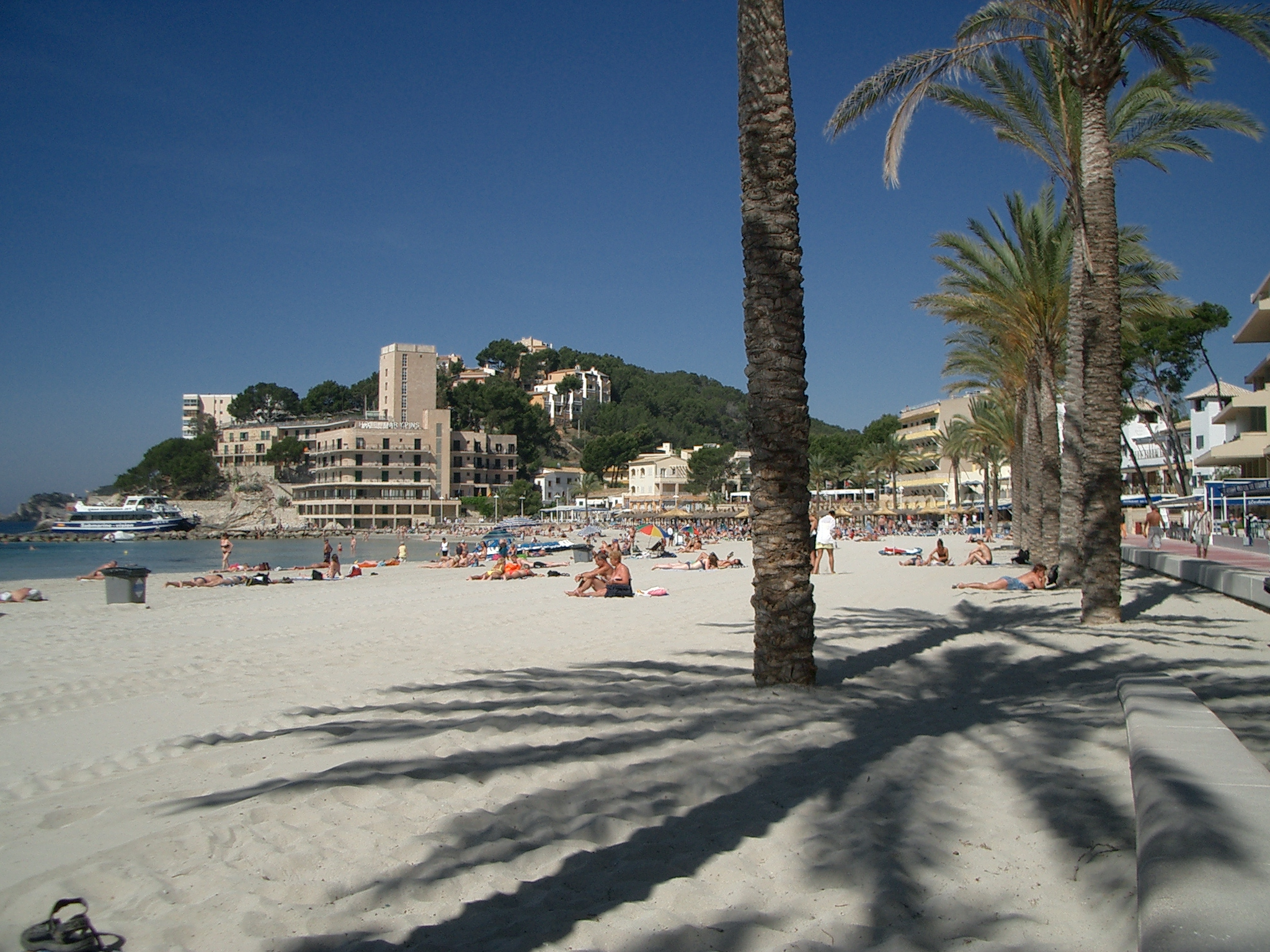 eigenes Foto - Mai 2005 - Gunnar Eberlein 18:32, 30. Mai 2006 (CEST)